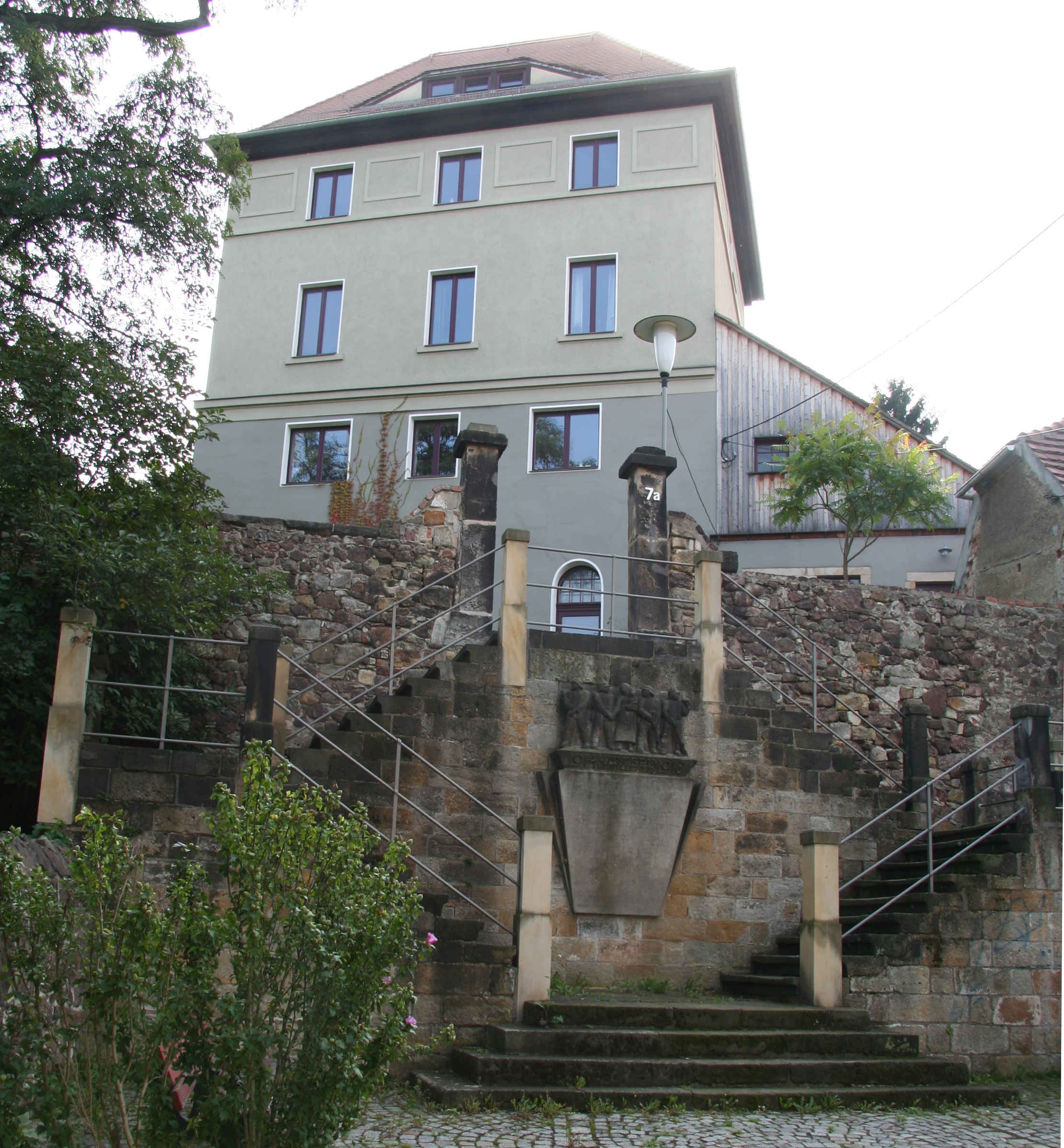 Wohnhaus Talstrasse 7a in Cossebaude